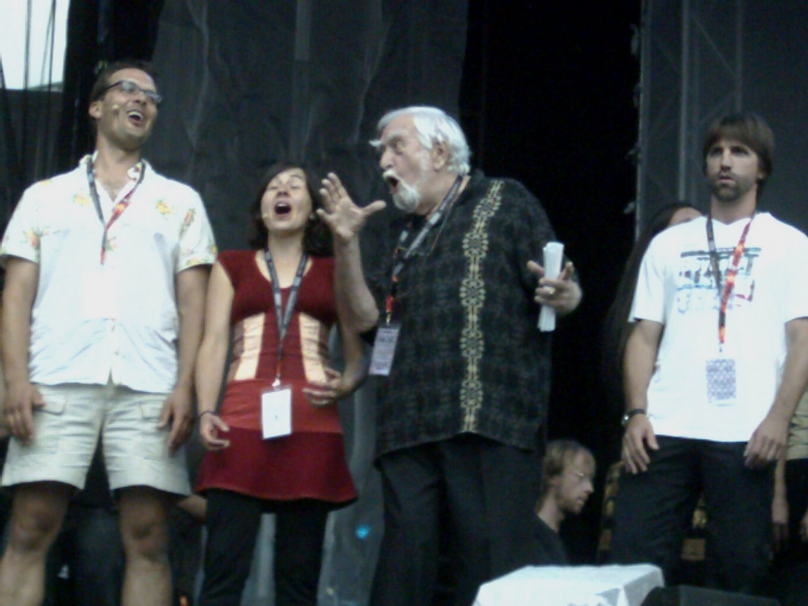 Jacques Languirand sur la scène des FrancoFolies de MontréalAussi sur scène : Hugo Latulippe, Laure Waridel et Steven Guilbeault.